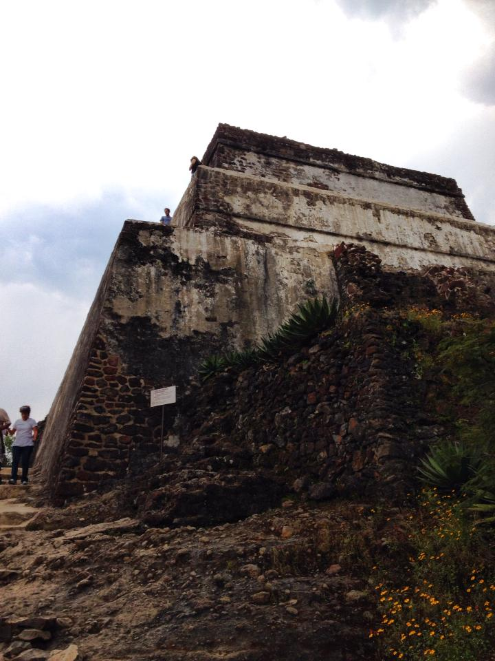 Tepoztlán